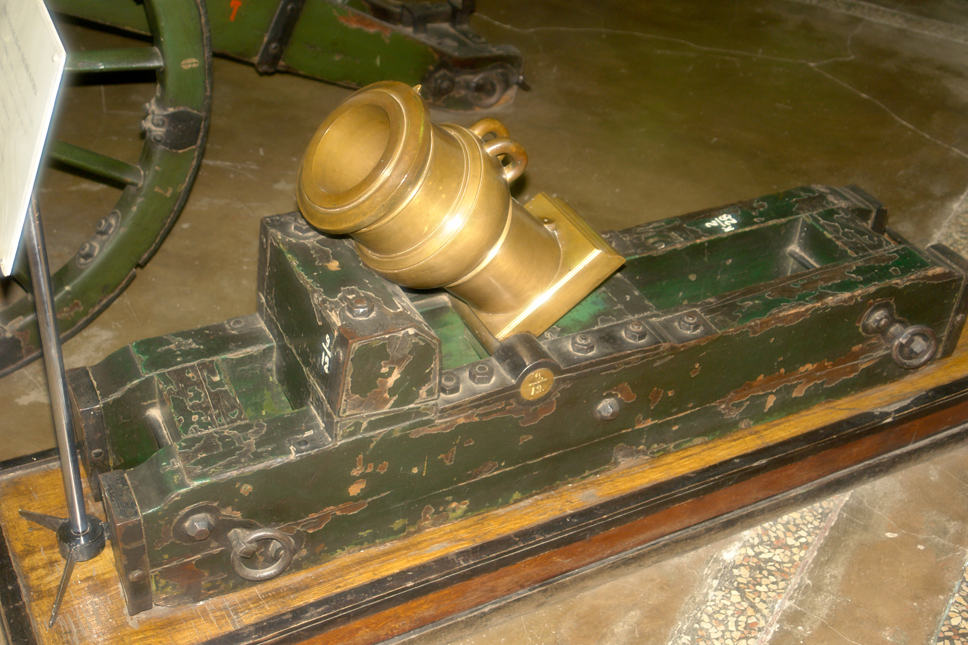 1/4 пудовая (123-мм) опытная мортира. Бронза, 41 см. Масса 73 кг. Отлит в первой четверти XIX в. Станок мортирный образца 1805 г. Военно-исторический музей артиллерии, инженерных войск и войск связи, Санкт-Петербург. moonspeek: 1/4 pood (123-mm) preproduction mortrar. Bronze, 41 cm. Mass: 73 kg. Casted in the first quarter of 19th century. Lathe created in 1805. Artillery museum (Saint Petersburg).